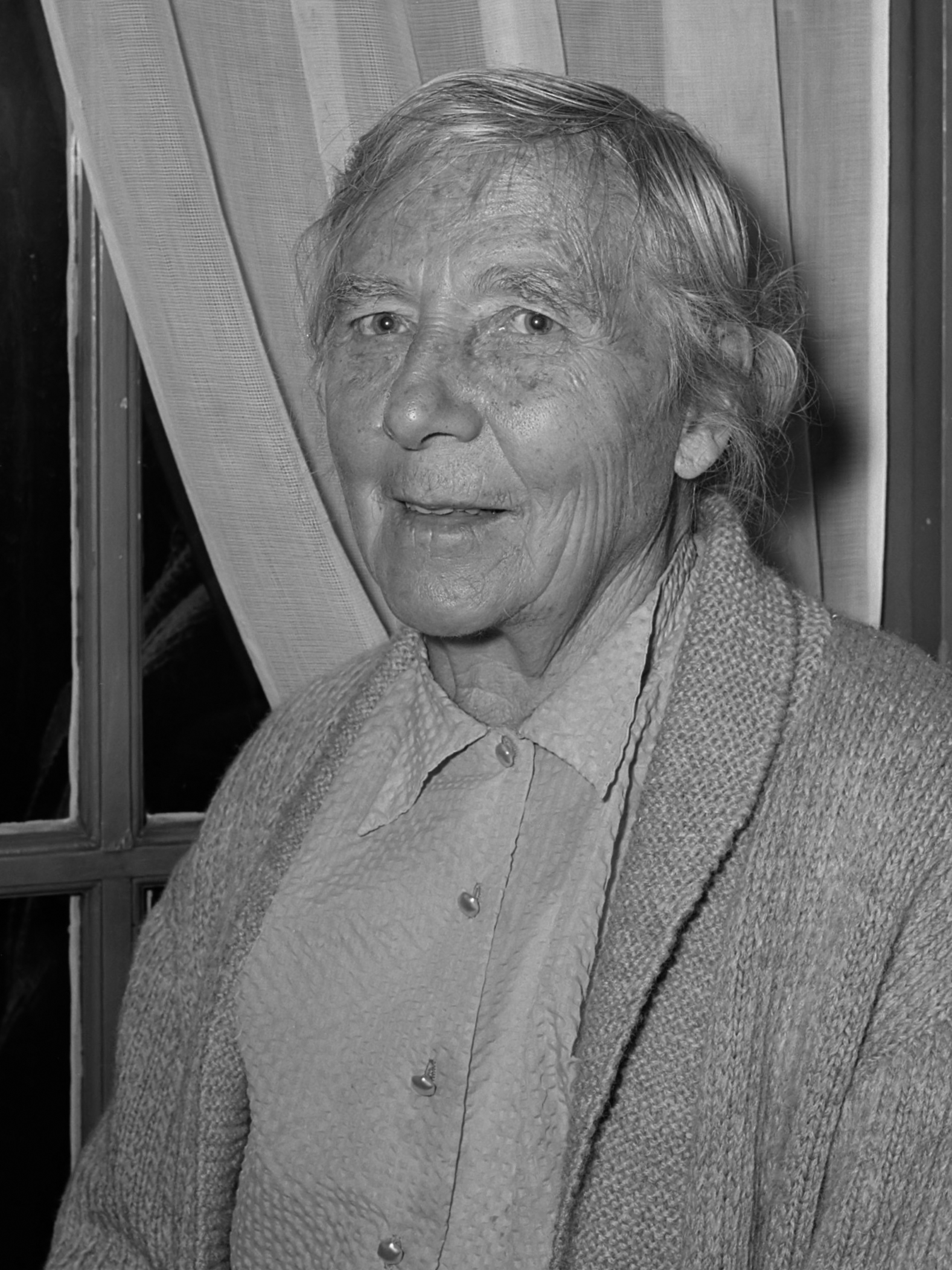 Mevrouw Roogaards-Sandberg 27 oktober 80 jaar , nog steeds actrice. Opnamen aan huis 9 oktober 1956